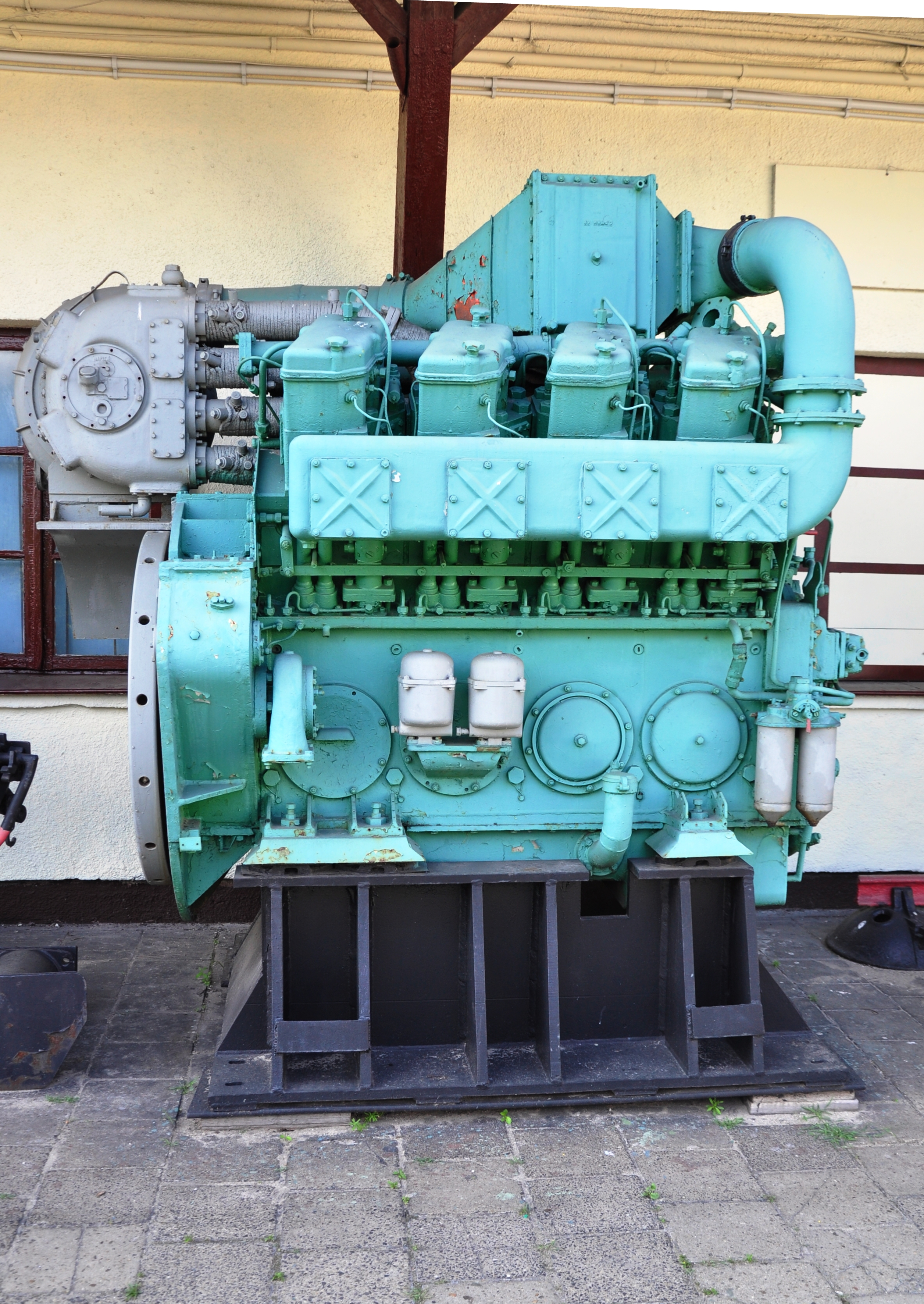 Eisenbahnmuseum Warschau